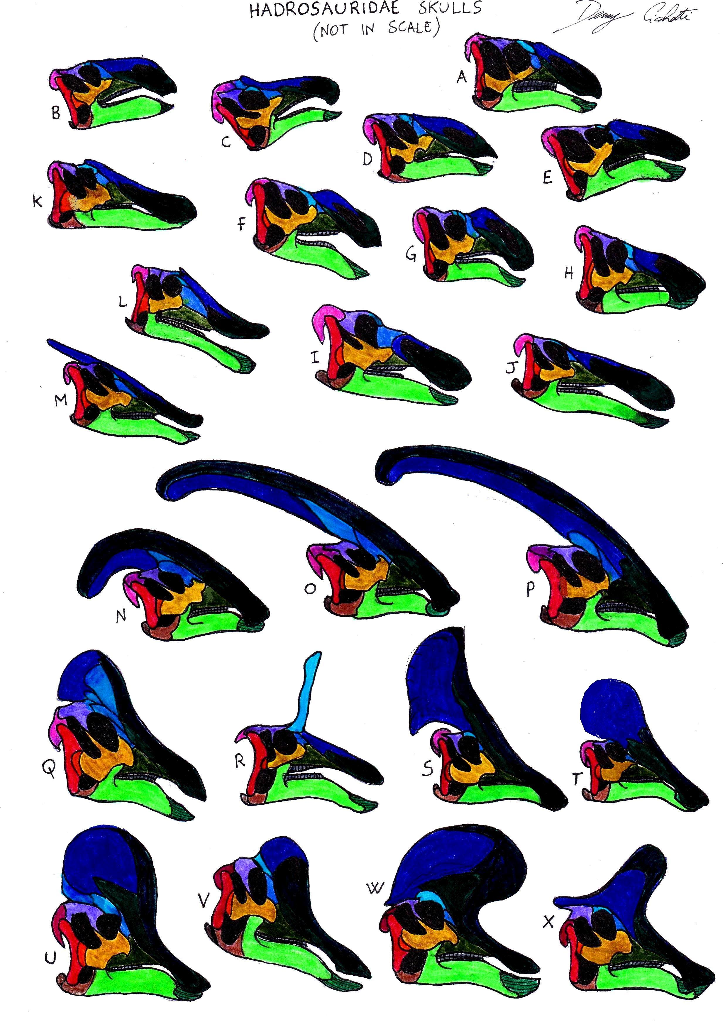 Interlingua: A = Lophorhothon atopus B = Acristavus gagslarsoni C = Maiasaura peeblesorum D = Brachylophosaurus canadensis E = Kritosaurus navajovius F = Gryposaurus notabilis G = Gryposaurus monumentensis H = Kundurosaurus nagornyi I = Edmontosaurus regalis J = Anatotitan copei K = Prosaurolophus maximus L = "Saurolophus" morrisi M = Saurolophus osborni N = Parasaurolophus cyrtocristatus O = Parasaurolophus walkeri P = Charonosaurus jiayinensis Q = Hypacrosaurus altispinus R = Tsintaosaurus spinorhinus S = Olorotitan arharensis T = Amurosaurus riabinini U = Corythosaurus casuarius V = Velafrons coahuilensis W = Lambeosaurus magnicristatus X = Lambeosaurus lambei